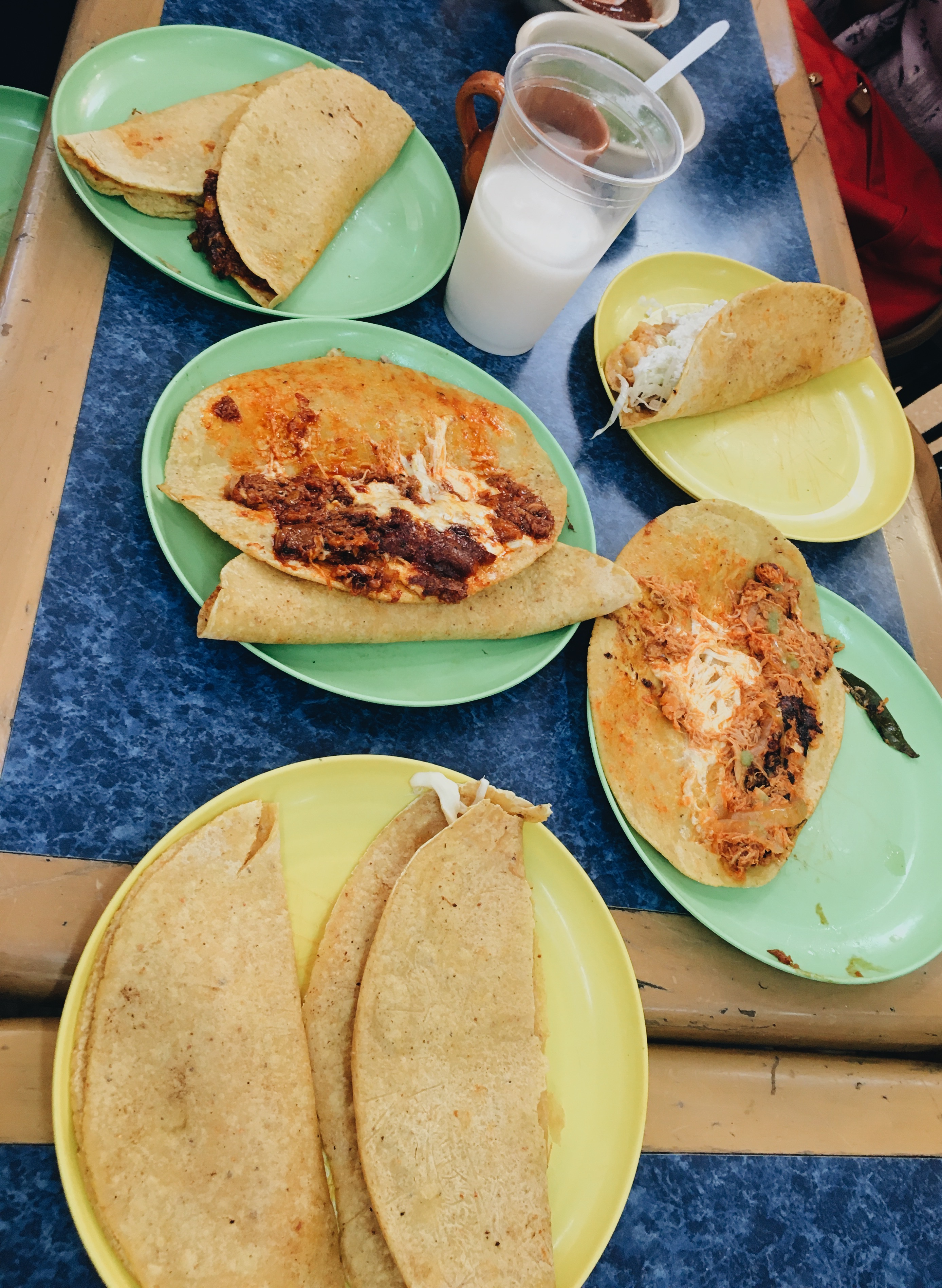 Platillo mexicano denominado quesadillas, son hechas a base de tortilla de maíz a mano. Puede estar rellena de diferentes ingredientes.